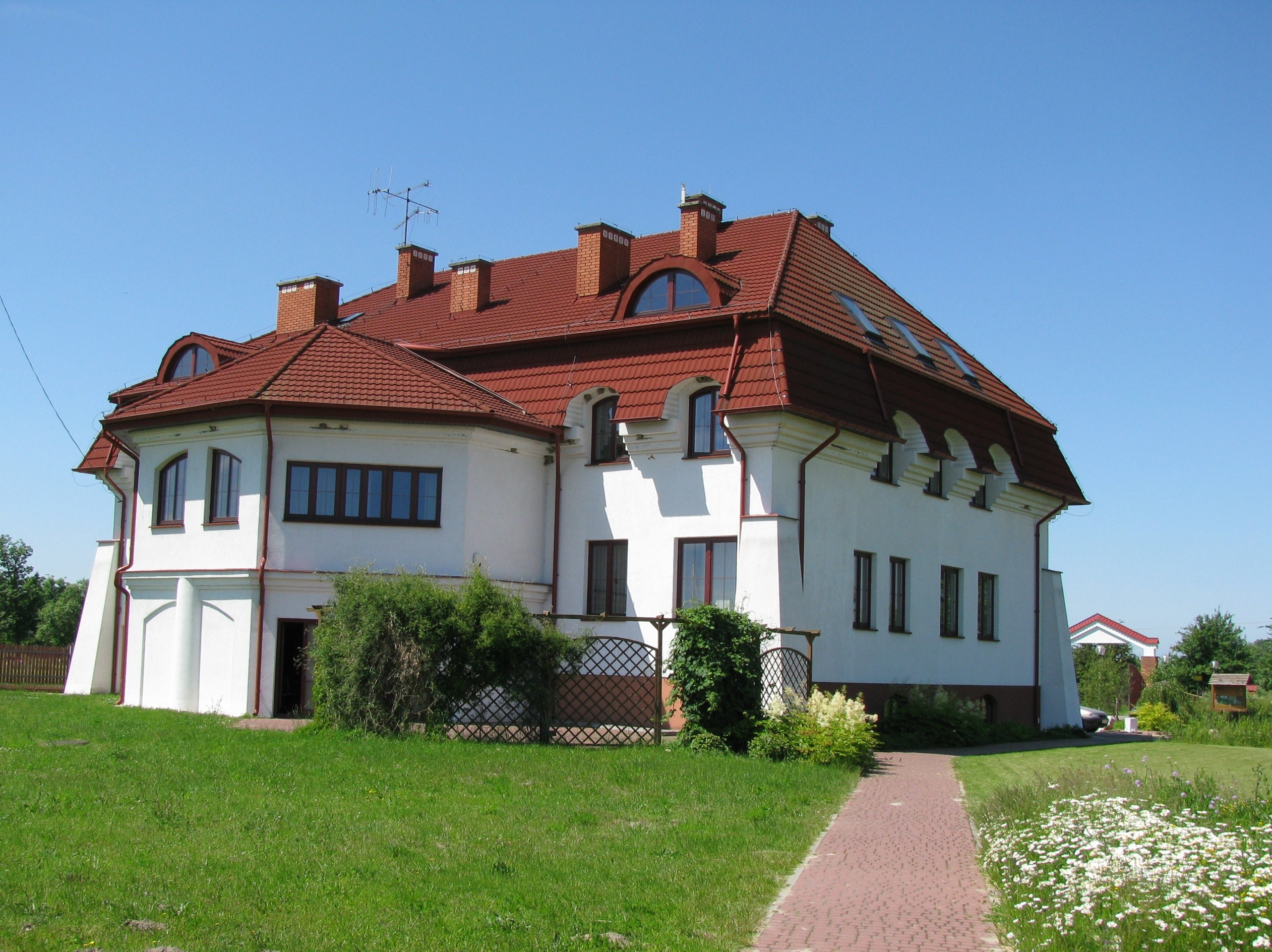 Urszulin - Ośrodek Dydaktyczno-Administracyjny Poleskiego Parku Narodowego.